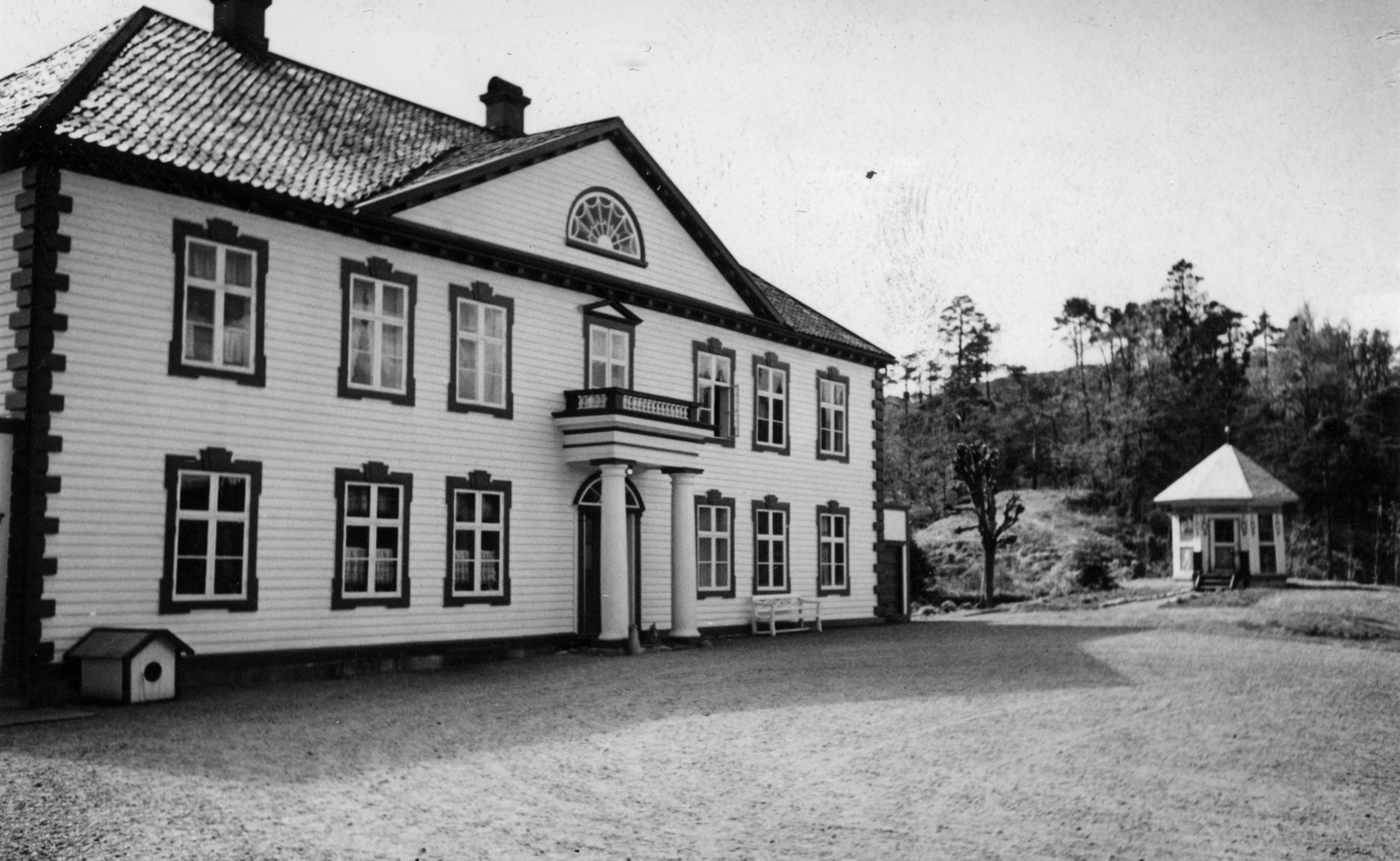 Strømsbo gård, Strømsbu gård, Aust-Agder Vestfasade This image on crowdsourcing geotagging platform Fotodugnad